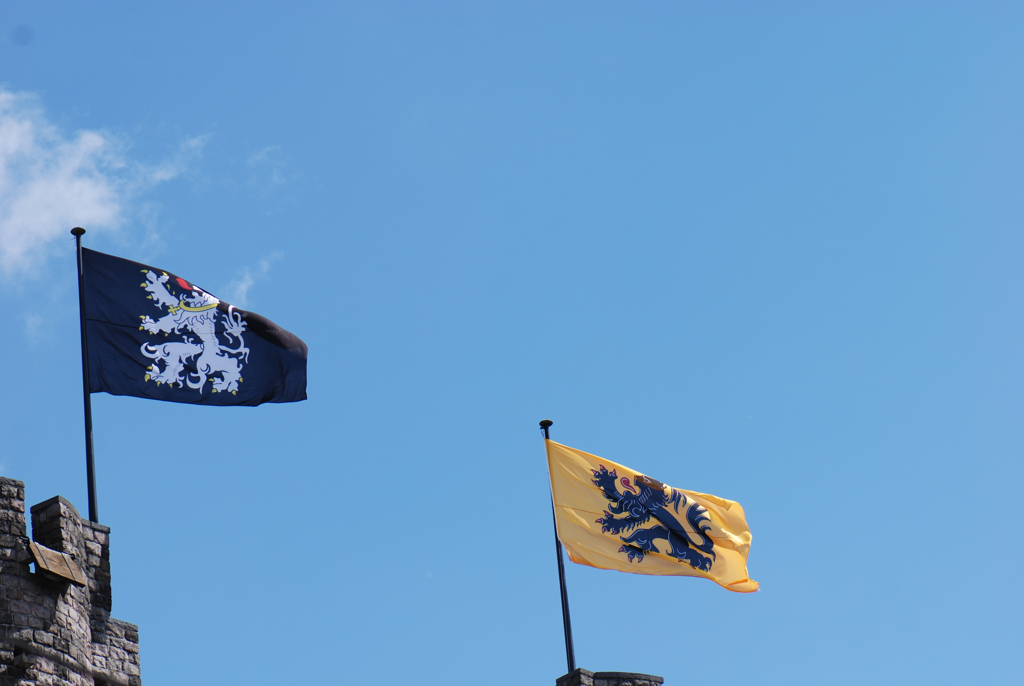 Belgium